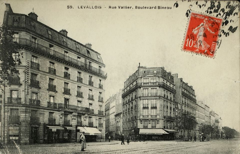 Levallois-Perret. Rue Vallier (devenue rue Louise-Michel) donnant sur le boulevard Bineau, à Levallois-Perret. Vue prise à partir de Neuilly-sur-Seine.